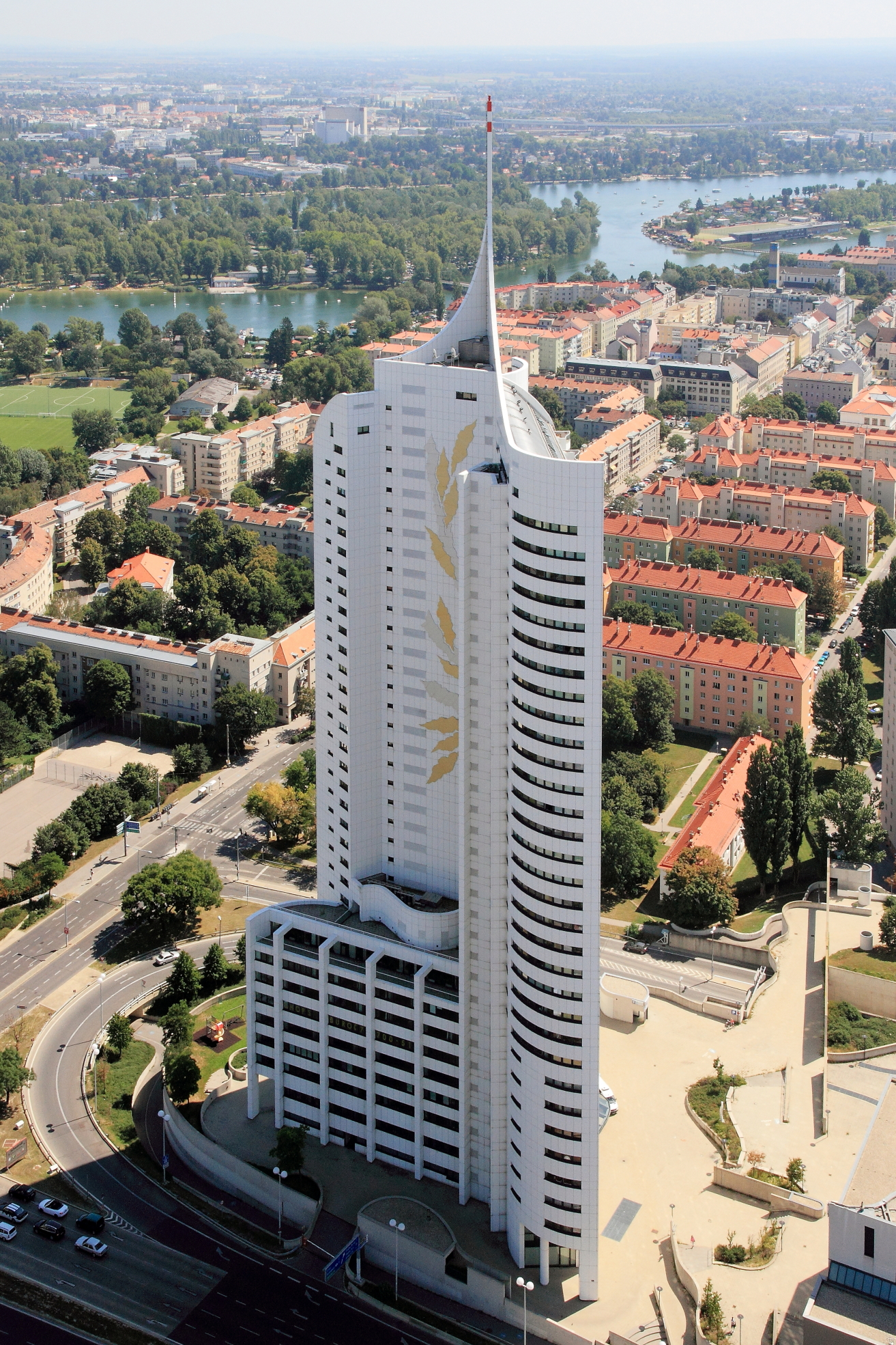 Hochhaus Neue Donau. Nach Plänen des Architekten Harry Seidler in den Jahren 1999-2002 errichtet.